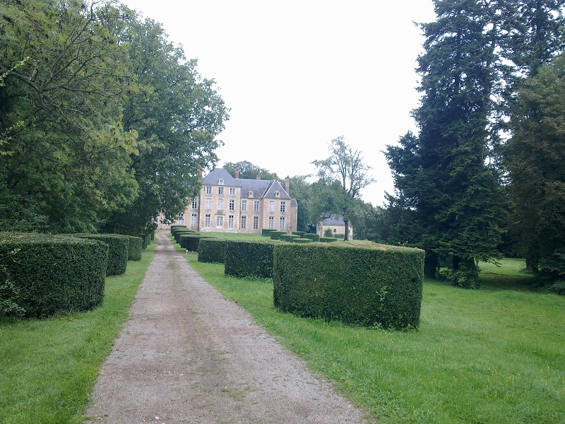 Le château de Bizy, à Parigny-les-Vaux